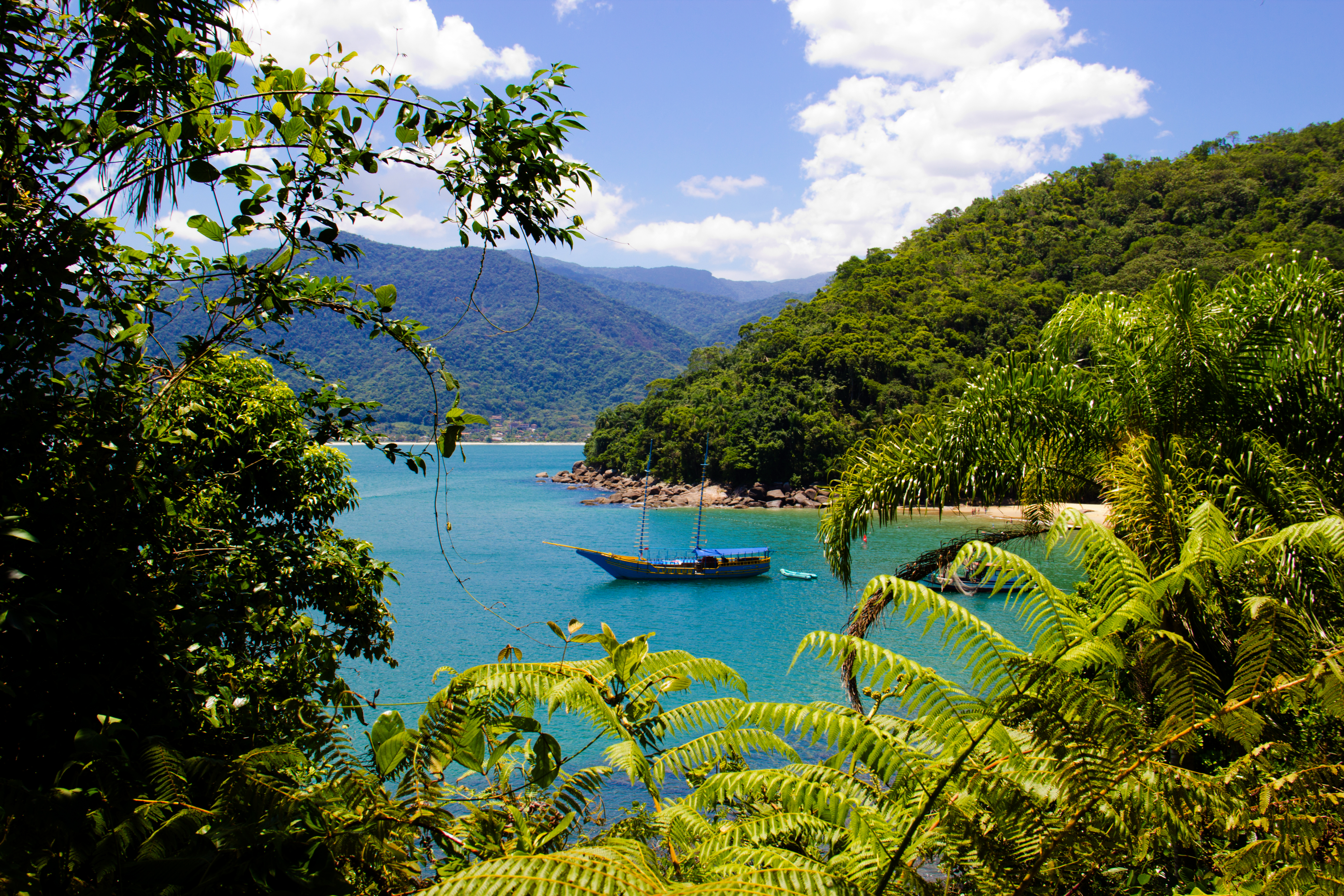 Uma pequena praia rodeada de verde. Sem nenhuma construção em sua orla o que da um ar de praia selvagem.